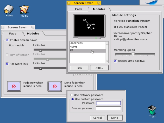 Haiku showing its screensaver preflet.